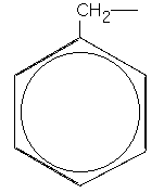 бензил